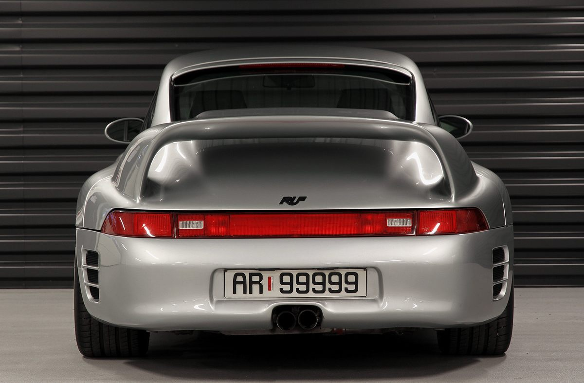 1997 RUF CTR2